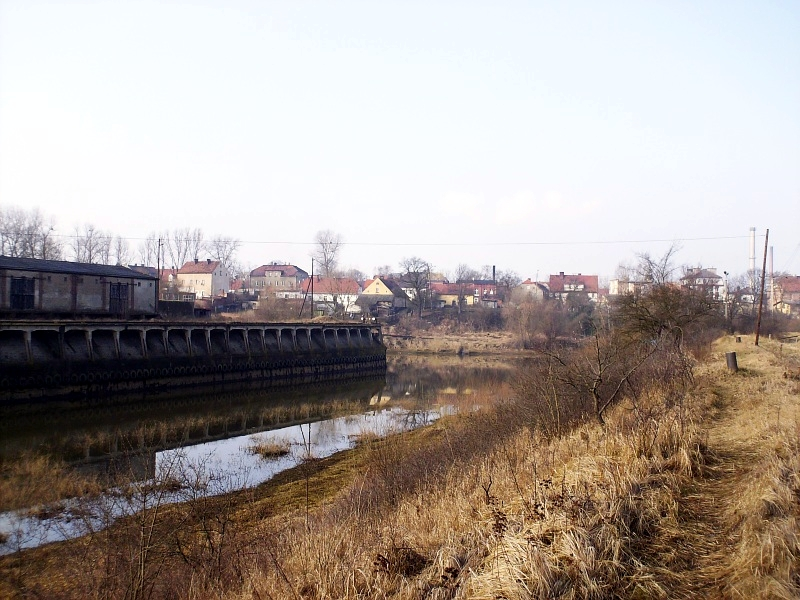 Jeden z kanałów portu w Malczycach